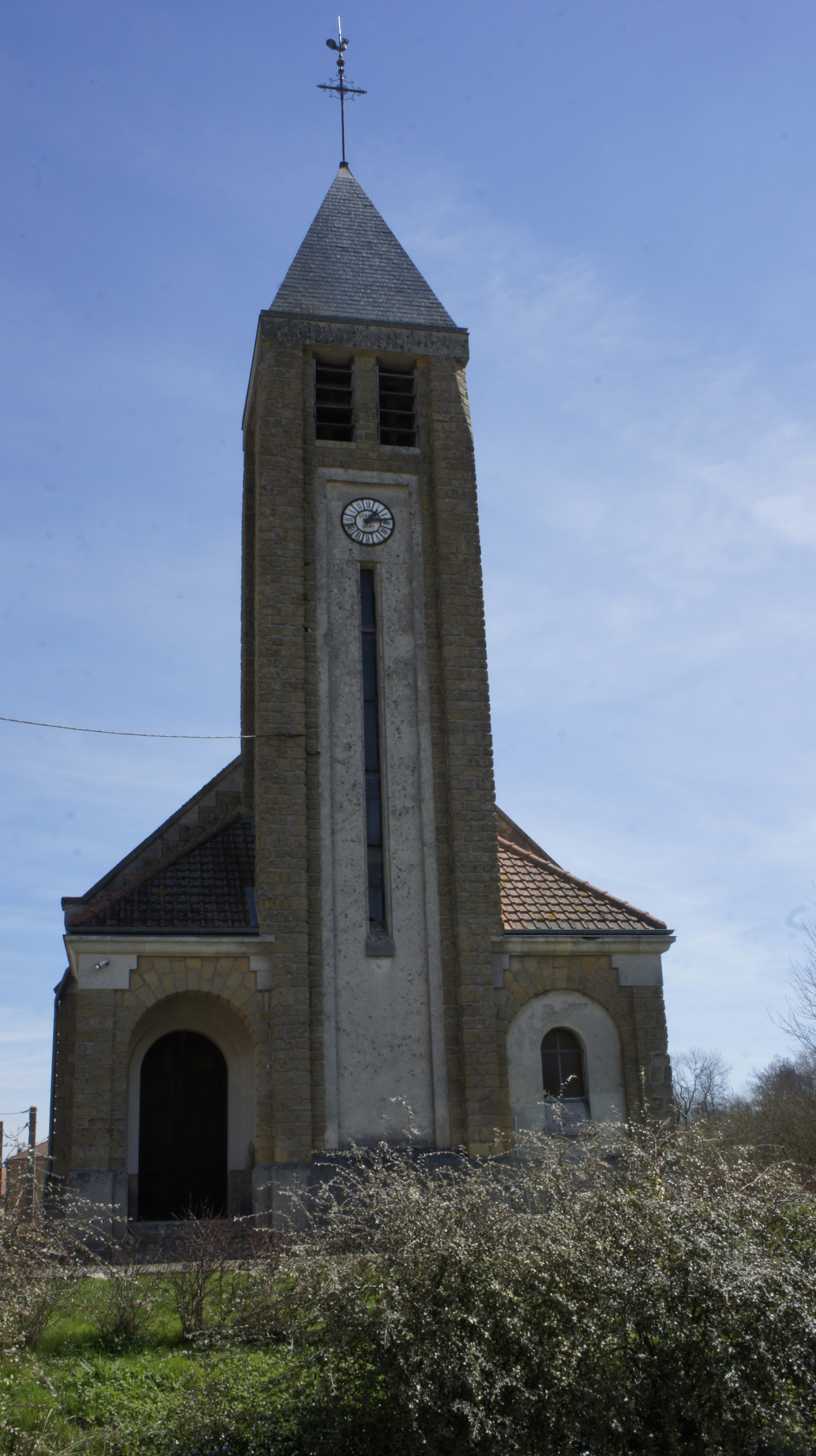 Église à Bignicourt .